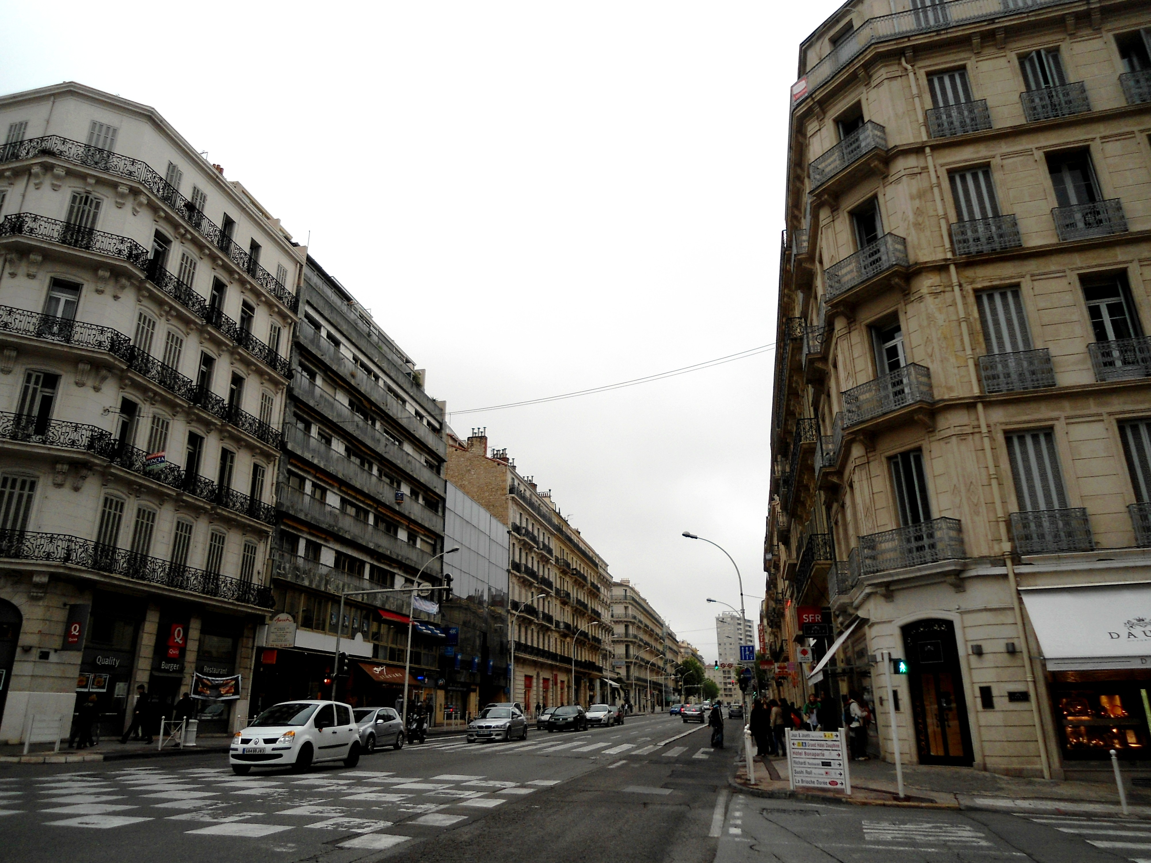 Balorad d'Estraborg, Tolon